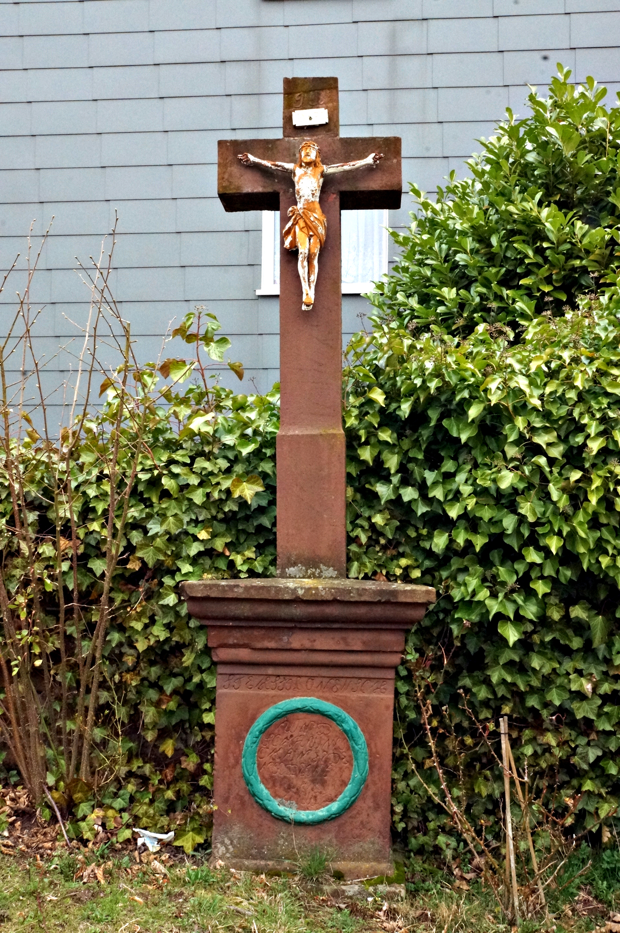 klassizistisches Wegekreuz, Mitte des 19. Jahrhunderts